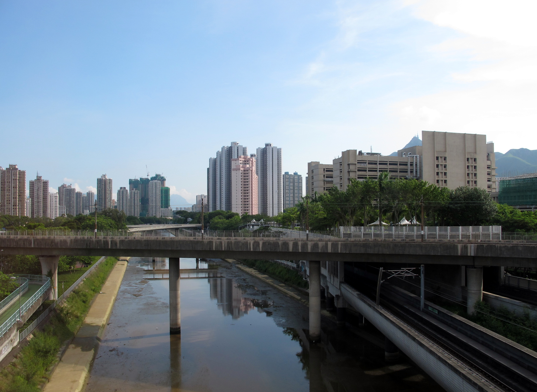 Tuen Mun River Channel